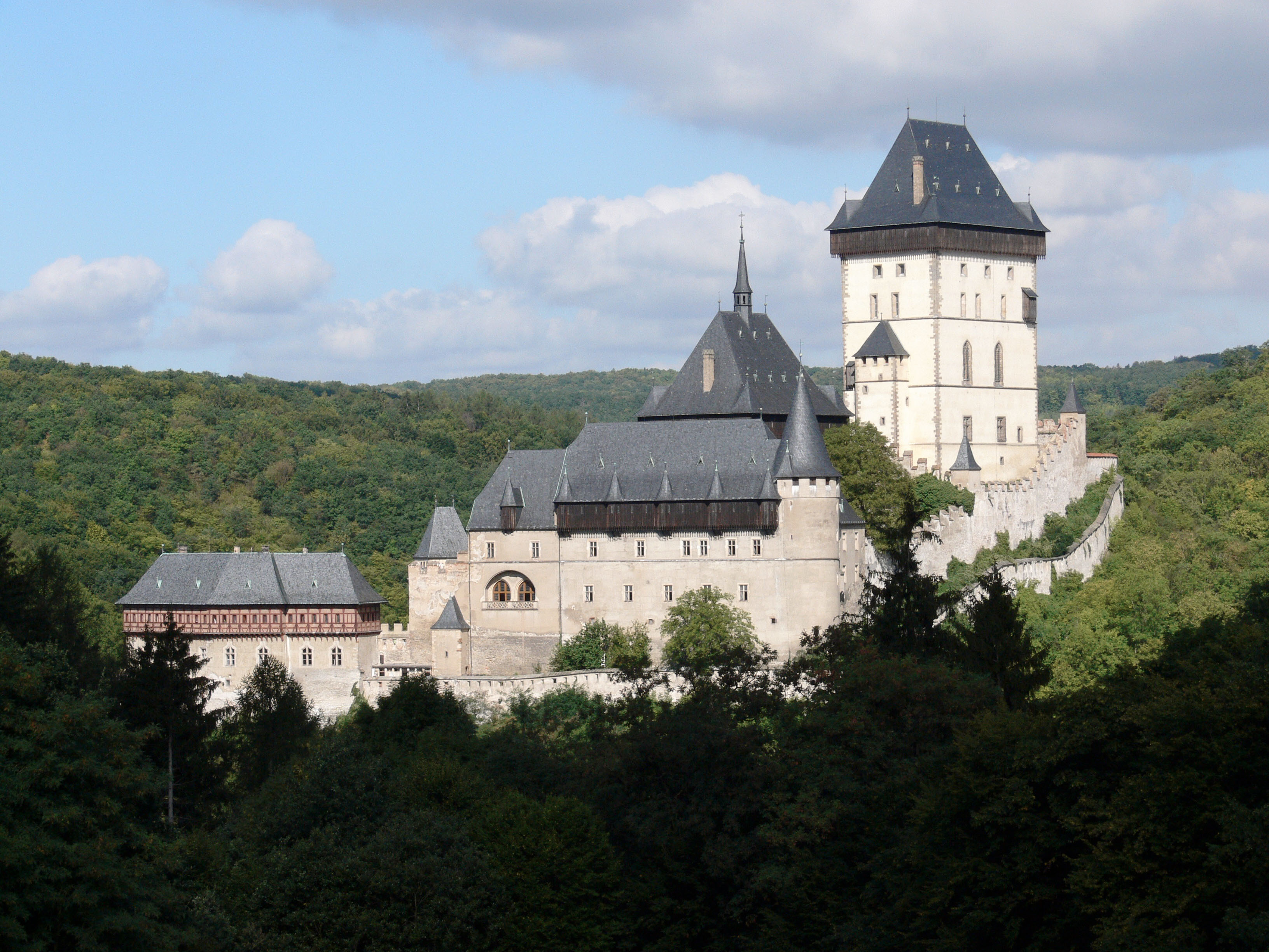 Pohled na hrad Karlštejn od jihovýchodu